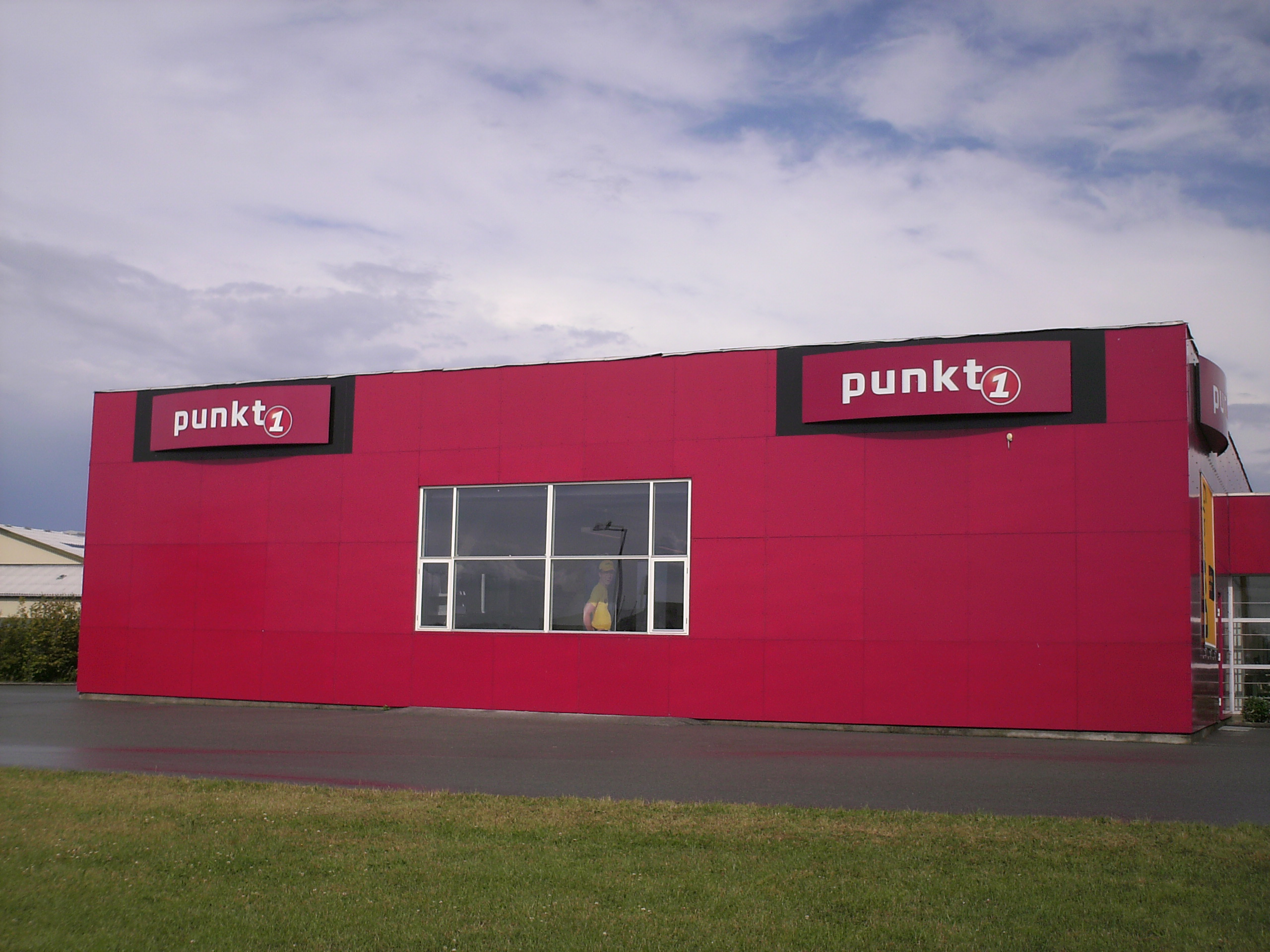 A punkt1 shop